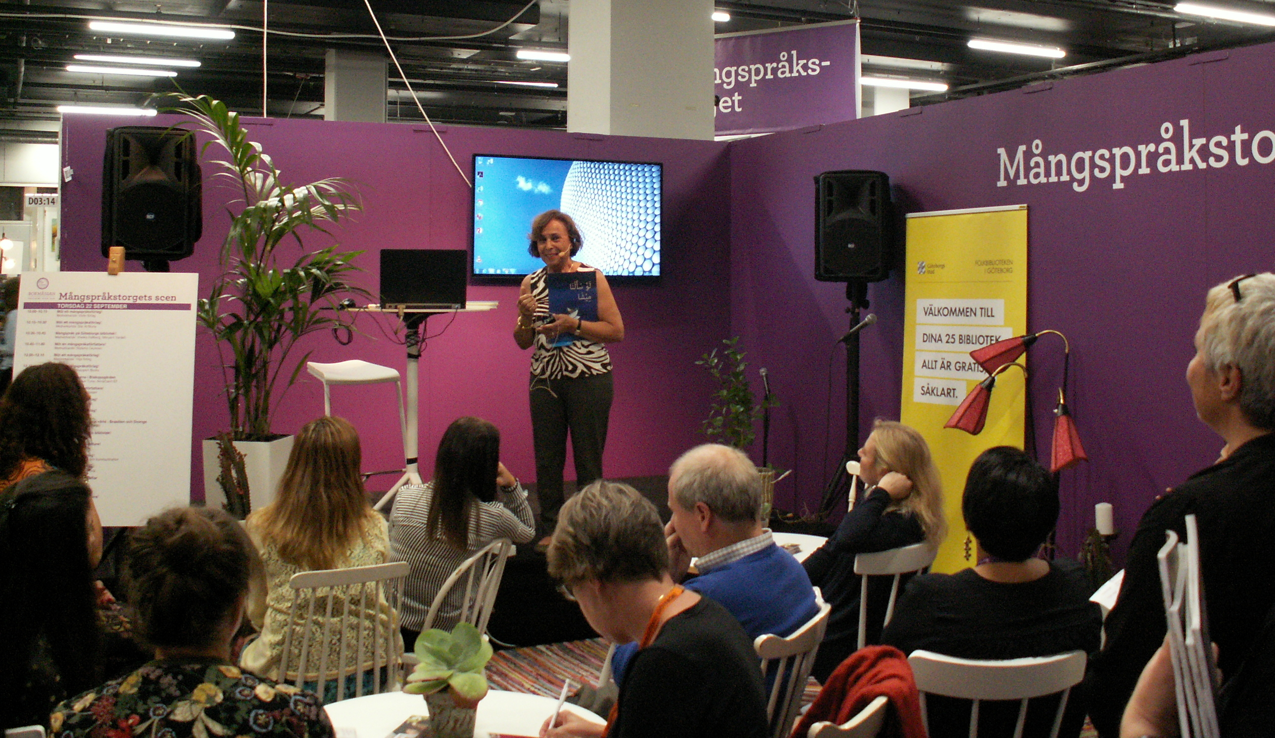 Mona Henning och förlaget Dar al Muna vid Mångspråkstorget, på Bokmässan i Göteborg 2016.